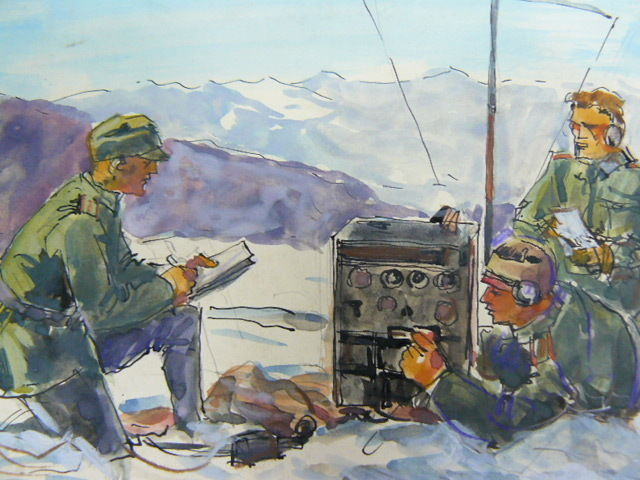 Albert Reich (1881–1942) – Gebirgsfunker (WW I)